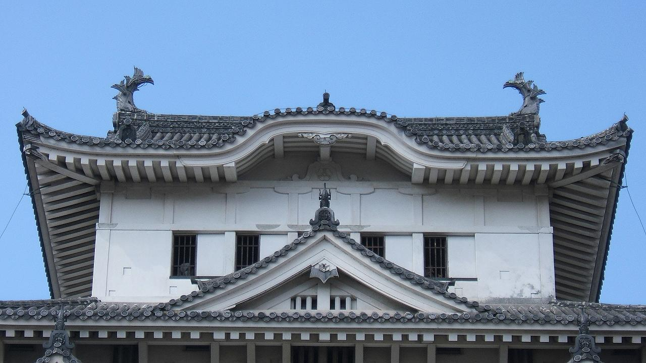 Summit